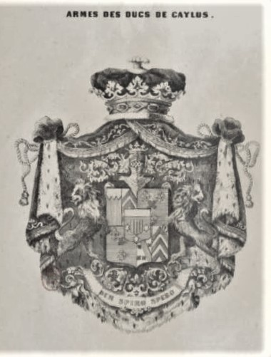 Armes des ducs de Caylus reproduites dans Le Biographe universel : revue générale biographique et littéraire ; juillet 1843 (BNF/gallica)